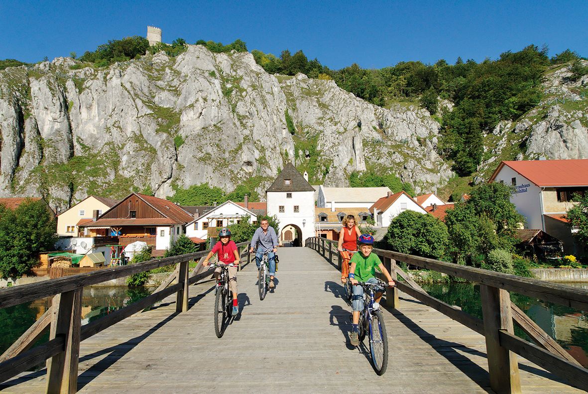 Fahrradfahrer auf der Brücke in Essing Lizenz